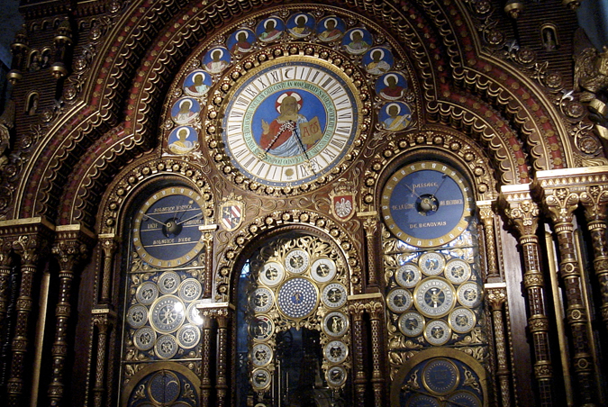 Horloge astronomique de la cathédrale de Beauvais